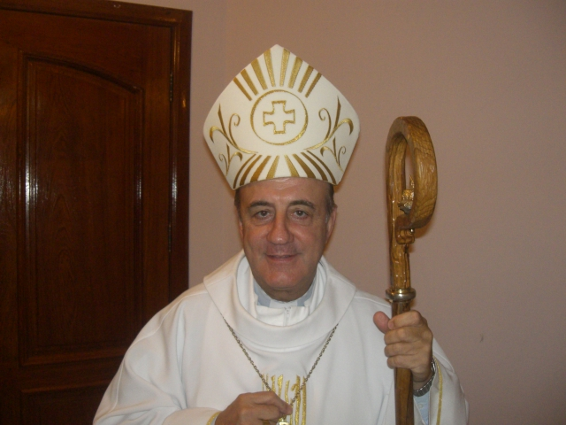 Arcebispo de Florianópolis